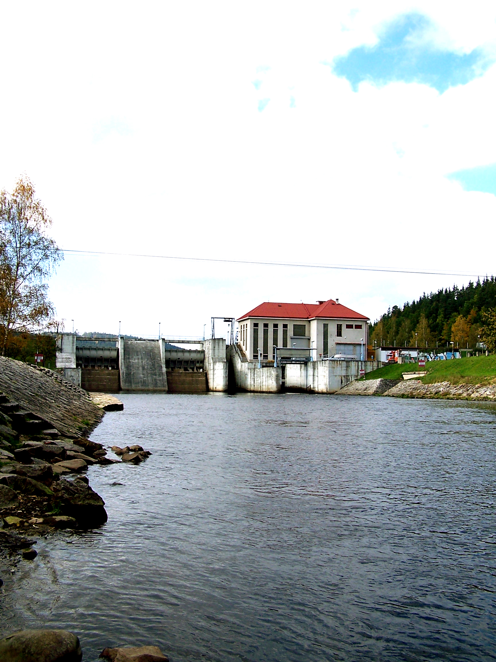 U Vyššího Brodu je přehrada Lipno II a výchozí kemp pro vodáky